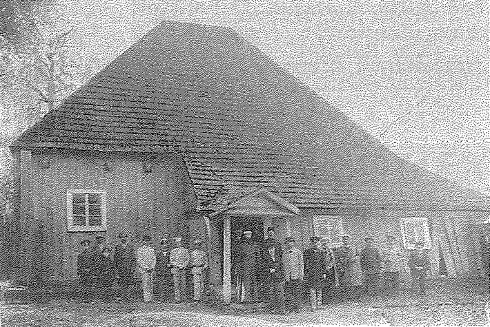 Беларуская (тарашкевіца): Менск (Miensk), Татарская Слабада (Tatarskaja Słabada). Стары мячэт